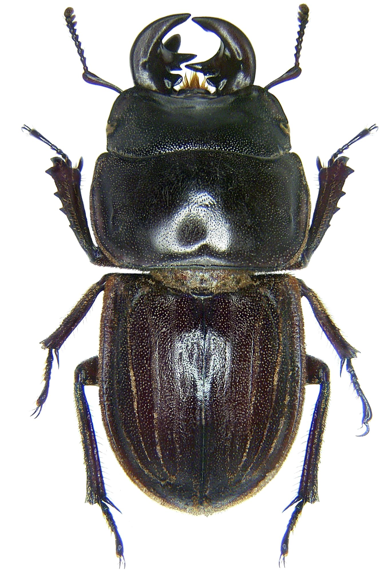 Familie: Lucanidae Grösse: 18-39 mm Fundort: Neuseeland (Südinsel) leg. J. Pytlinski; det. A.Skale Foto: U.Schmidt, 2007